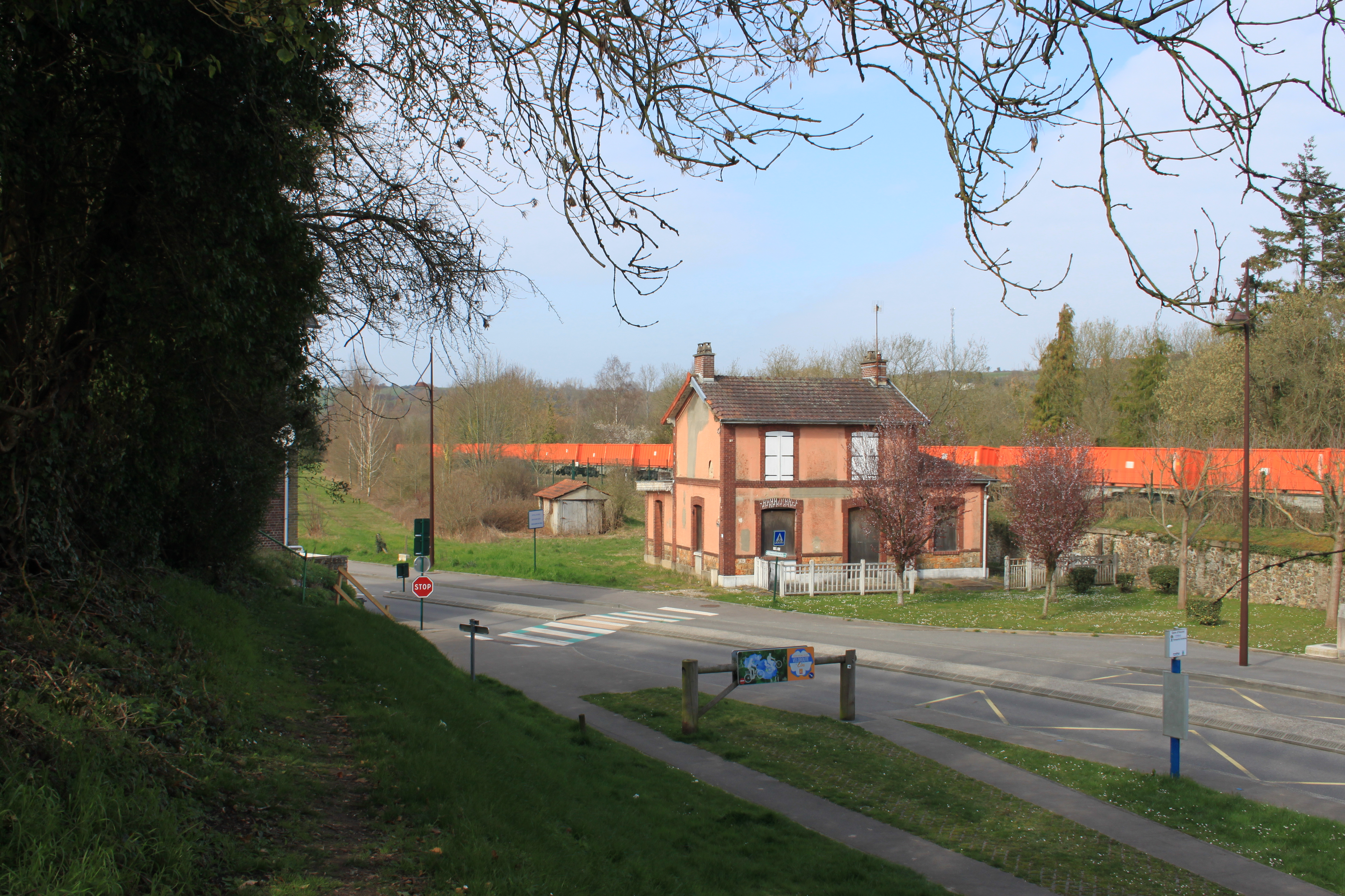 Ligne de Malaunay à Dieppe, train de terre issue du chantier de la RN27 pour le quartier Flaubert à Rouen . Ancienne gare de PETIT-APPEVILLE, (et ancien PN n°1 de la ligne de Dieppe à Fécamp aménagée en avenue-verte) . ( Même vue qu'une photographie de carte postale ancienne ) .